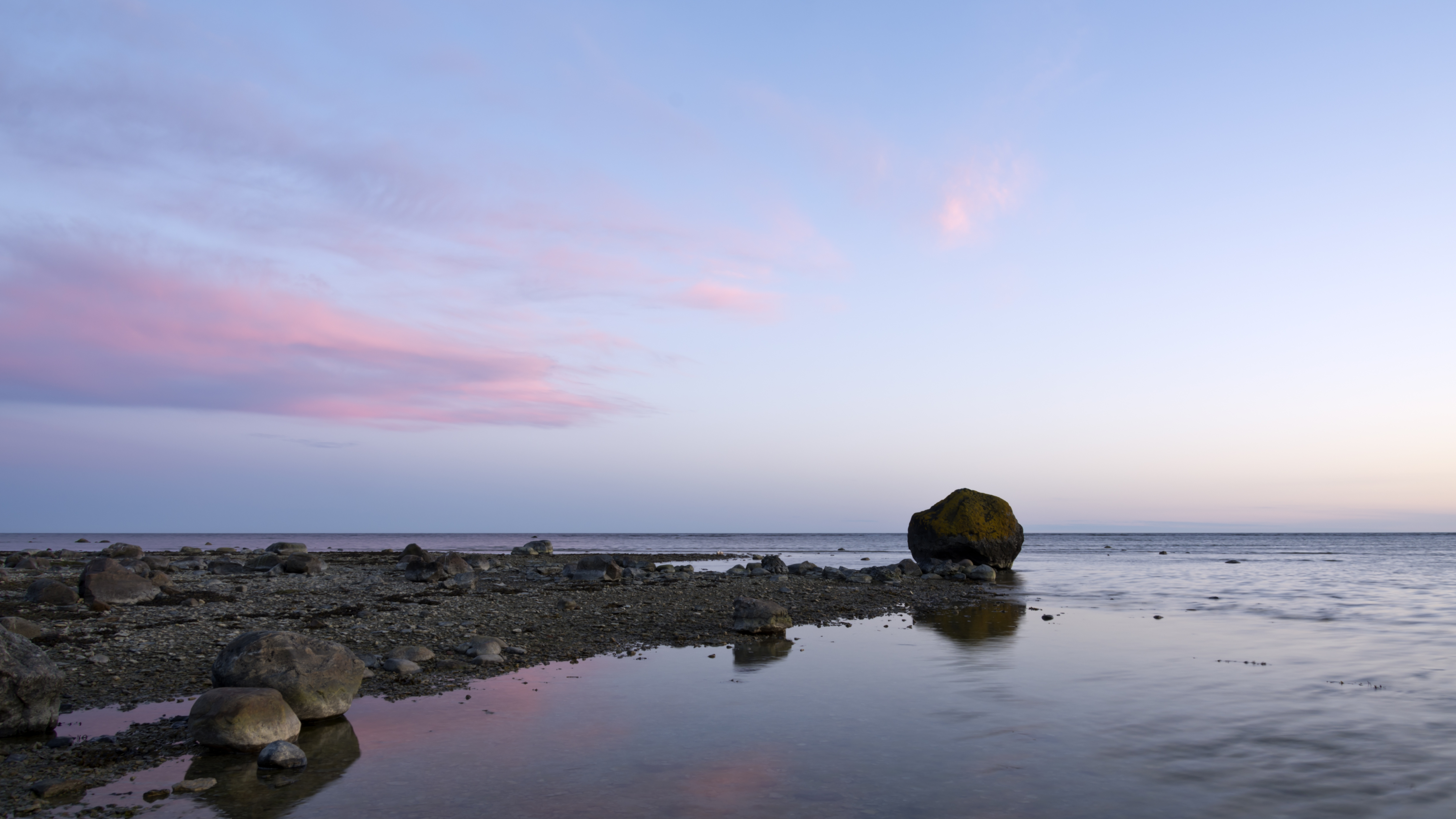 Osmussaare I rahnuderühm, Nõva-Osmussaare hoiuala